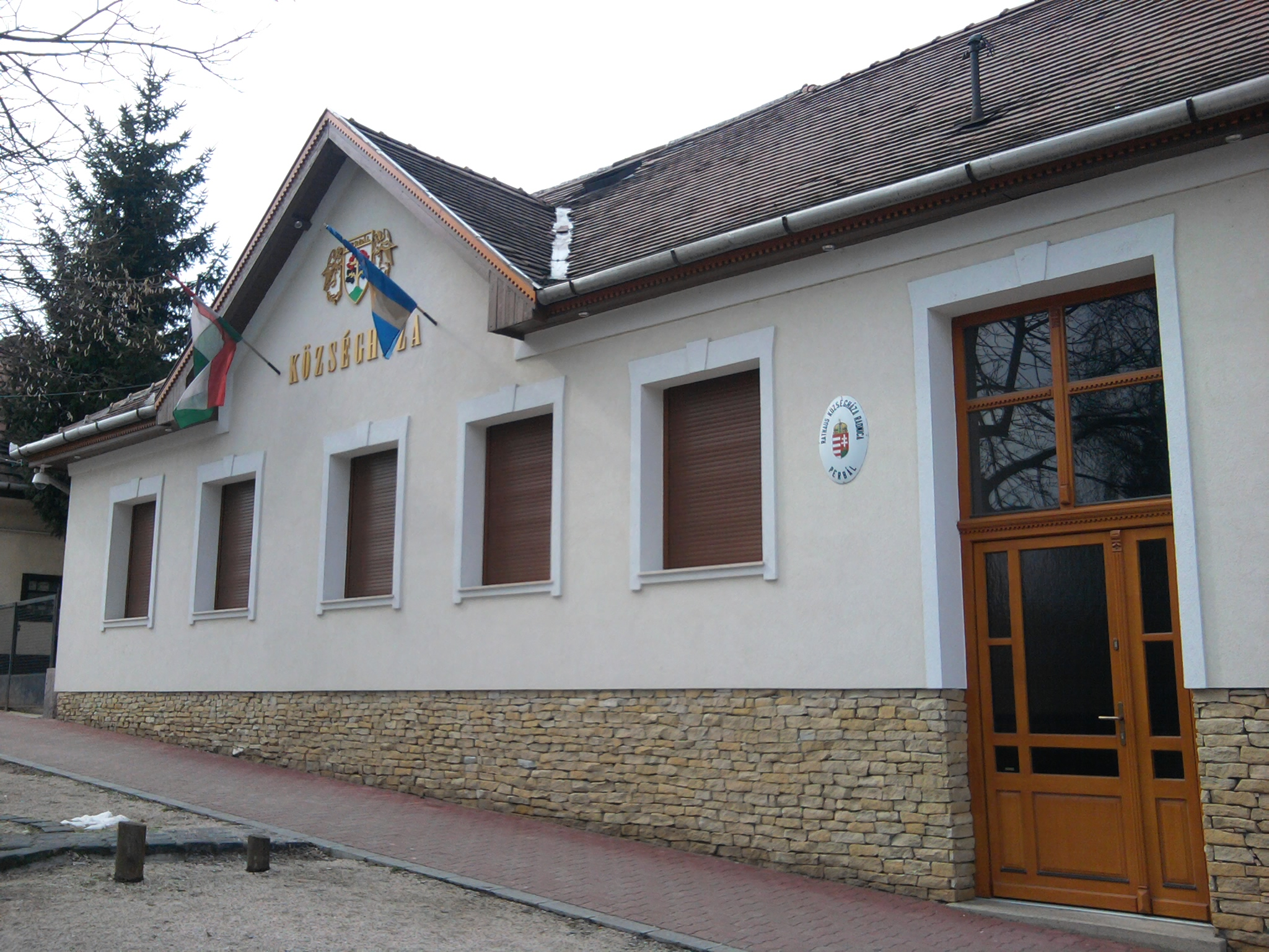 Perbáli községháza (Pest megye)